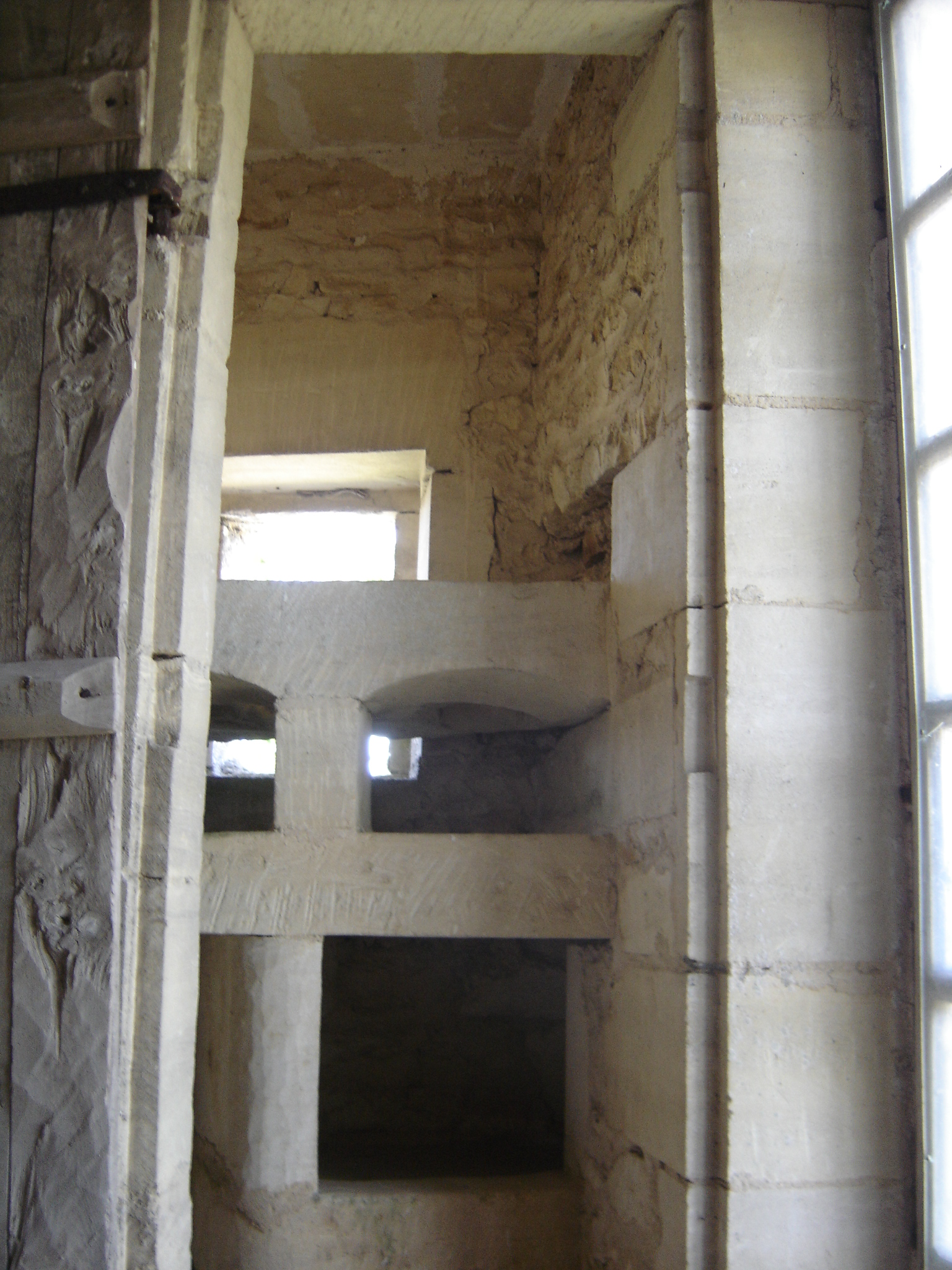 Église de la Sainte-Trinité, (Inscrit, 2001) permettait de faire la cuisine et la vaisselle grâce à l'évier avec écoulement de l'eau à l'extérieur en dessous , on posait les braises au 2è niveau, et les plats tout en haut .